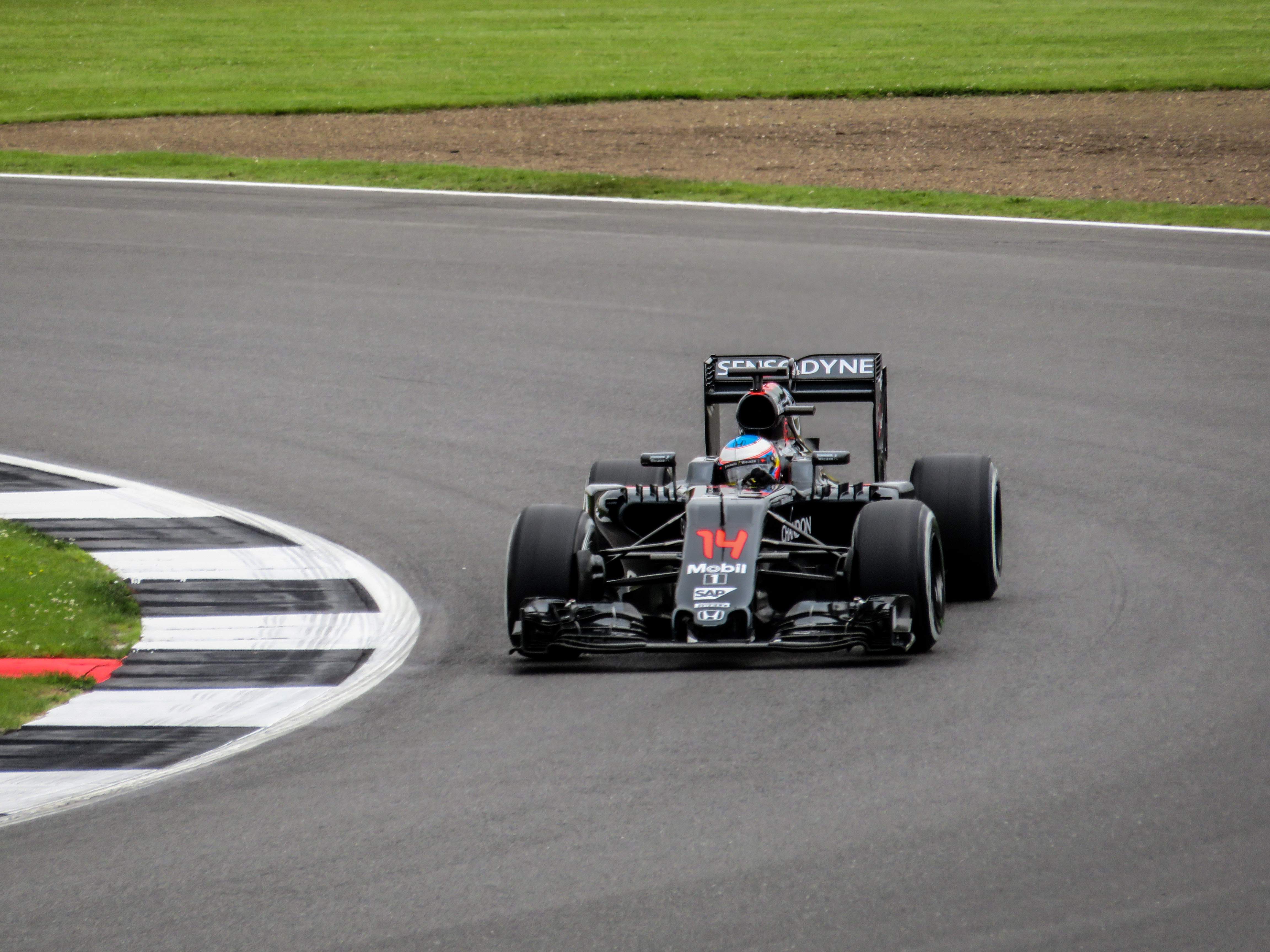 F1 - Mclaren Honda - Fernando Alonso